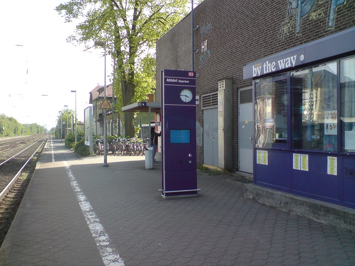 Bahnhof Münster-Hiltrup, Bahnsteig 1 mit dynamischer Fahrgastinformation, Fahrkartenautomaten und Kiosk. Blickrichtung südlich.